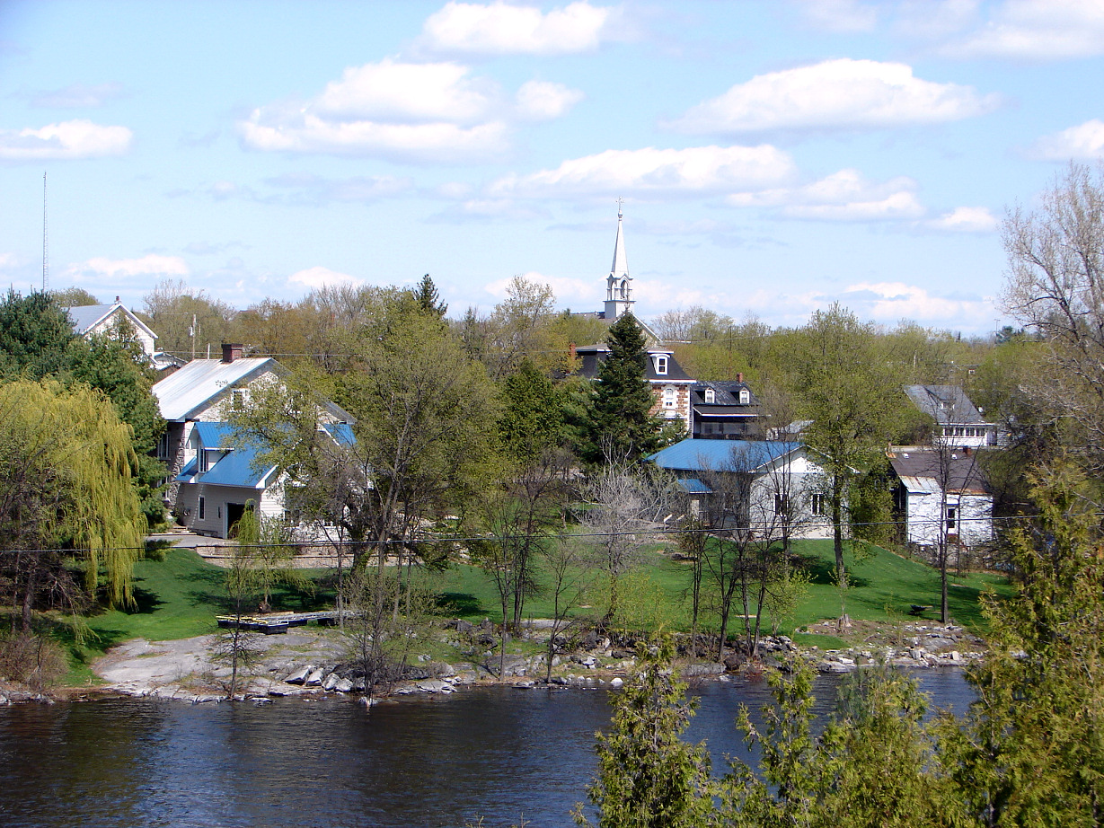 Portage-du-Fort, Quebec, Canada